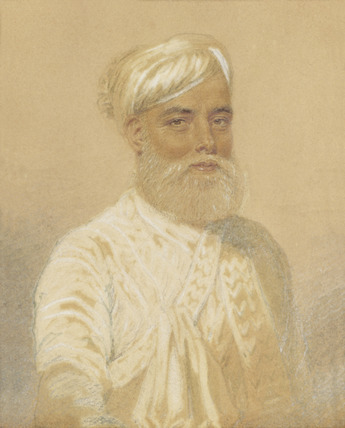 Nawab Walla Jah